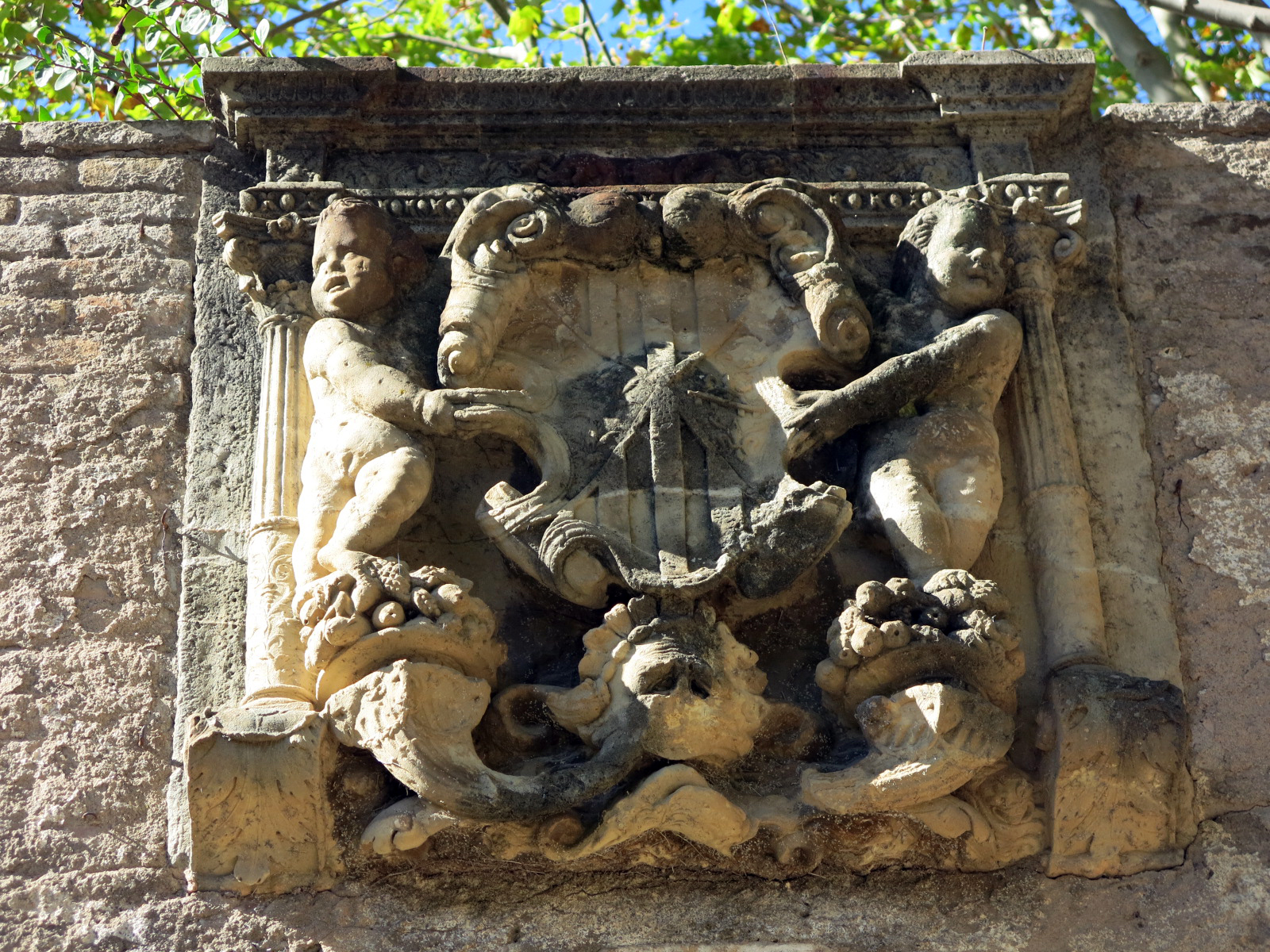 Torre Pallaresa (Santa Coloma de Gramenet)